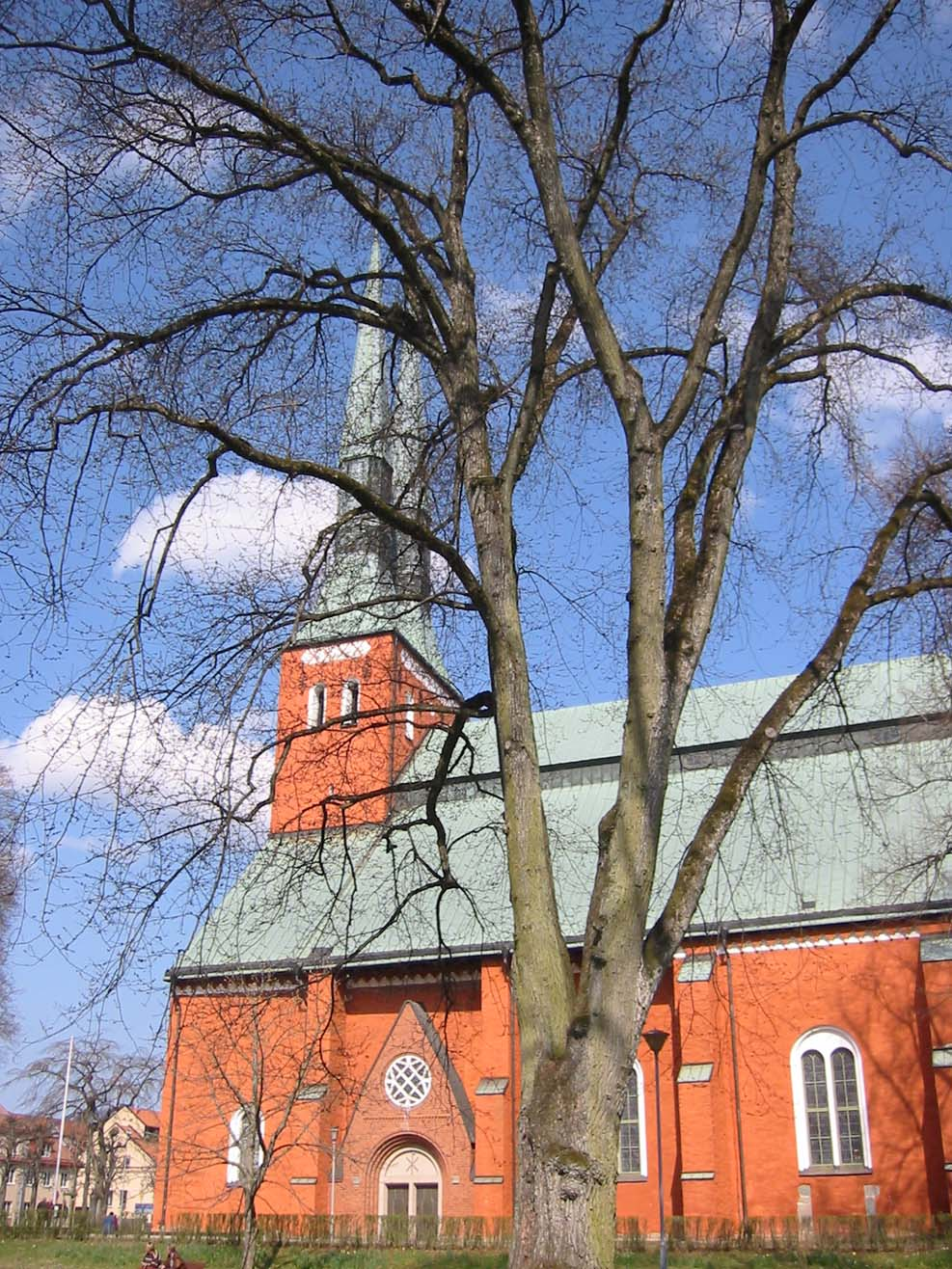 Växjö domkyrka